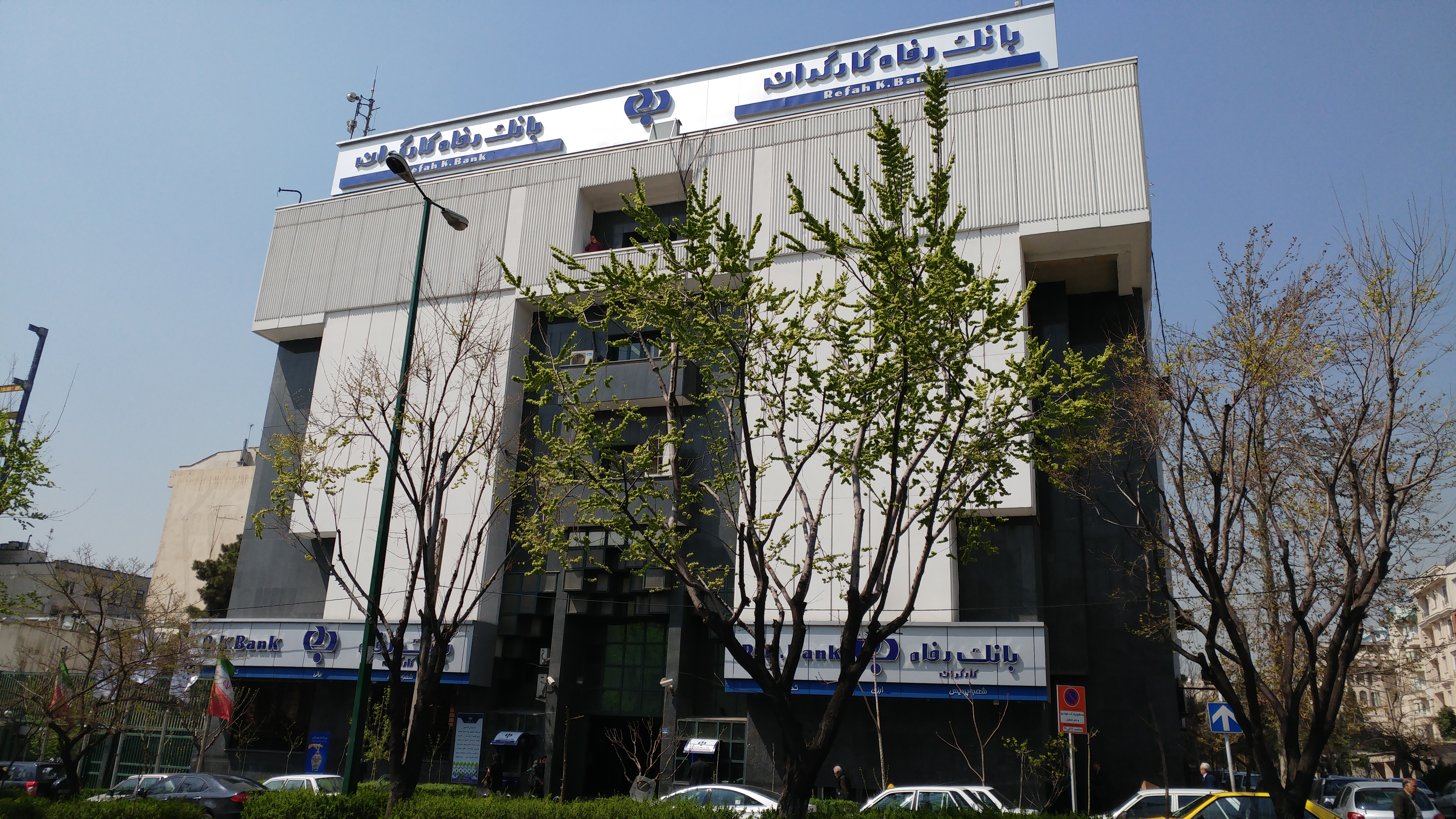 شعبه ارزی-ریالی بانک رفاه کد 144